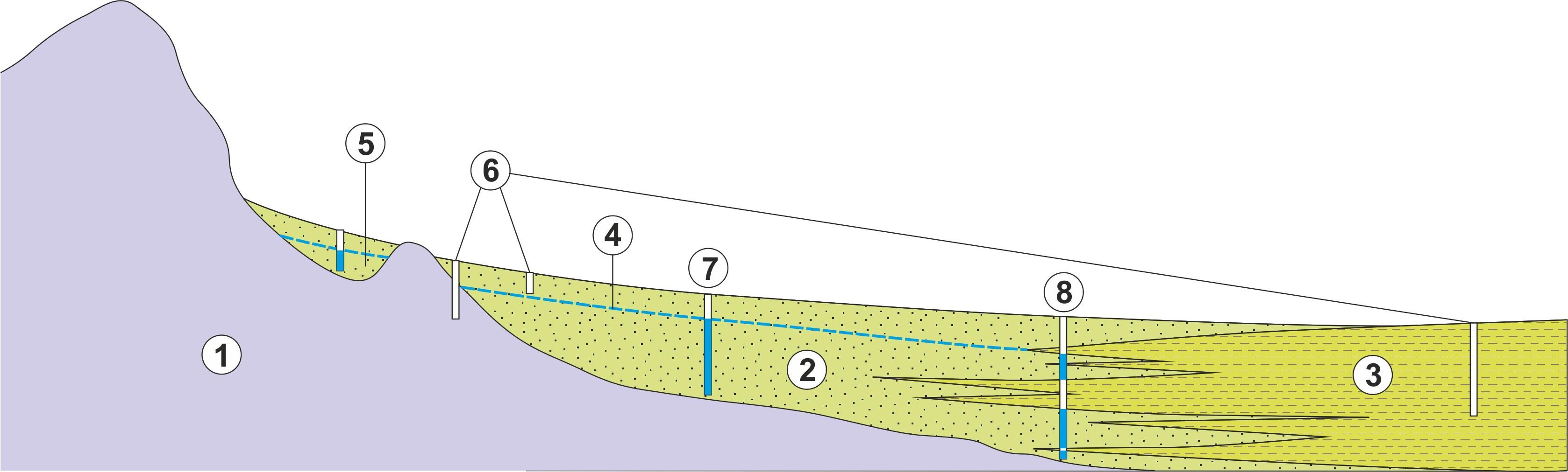 Схематический гидрогеологический разрез аллювиального конуса выноса